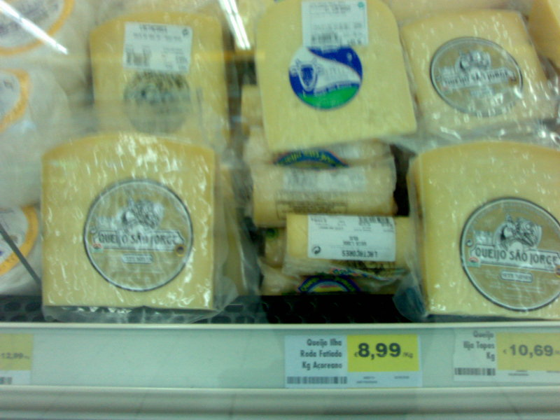 Queijo de São Jorge, um queijo dos Açores, em Portugal. "Queijo de São Jorge", a cheese from the Azores islands, in Portugal.